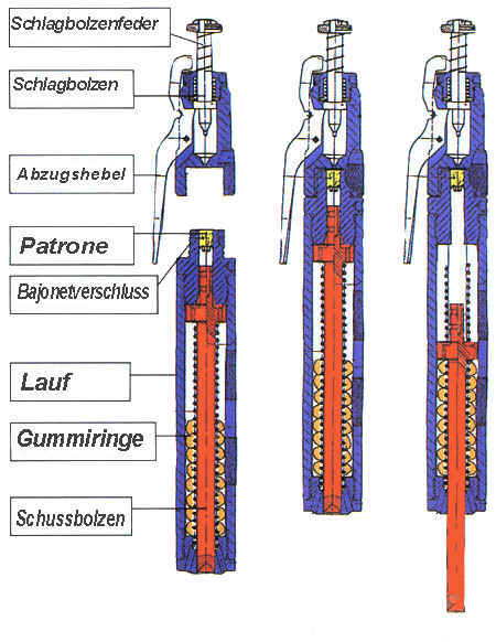 Der Aufbau des Bolzenschussapparates. Er besteht im wesentlichenaus: Lauf mit Verschlusskopf Schlagbolzen imt Schlagbozenfeder Abzugshebel Schussbolzen Schussbolzenrückholfeder Gummipuffer (Giummiringe oder Gummihülse